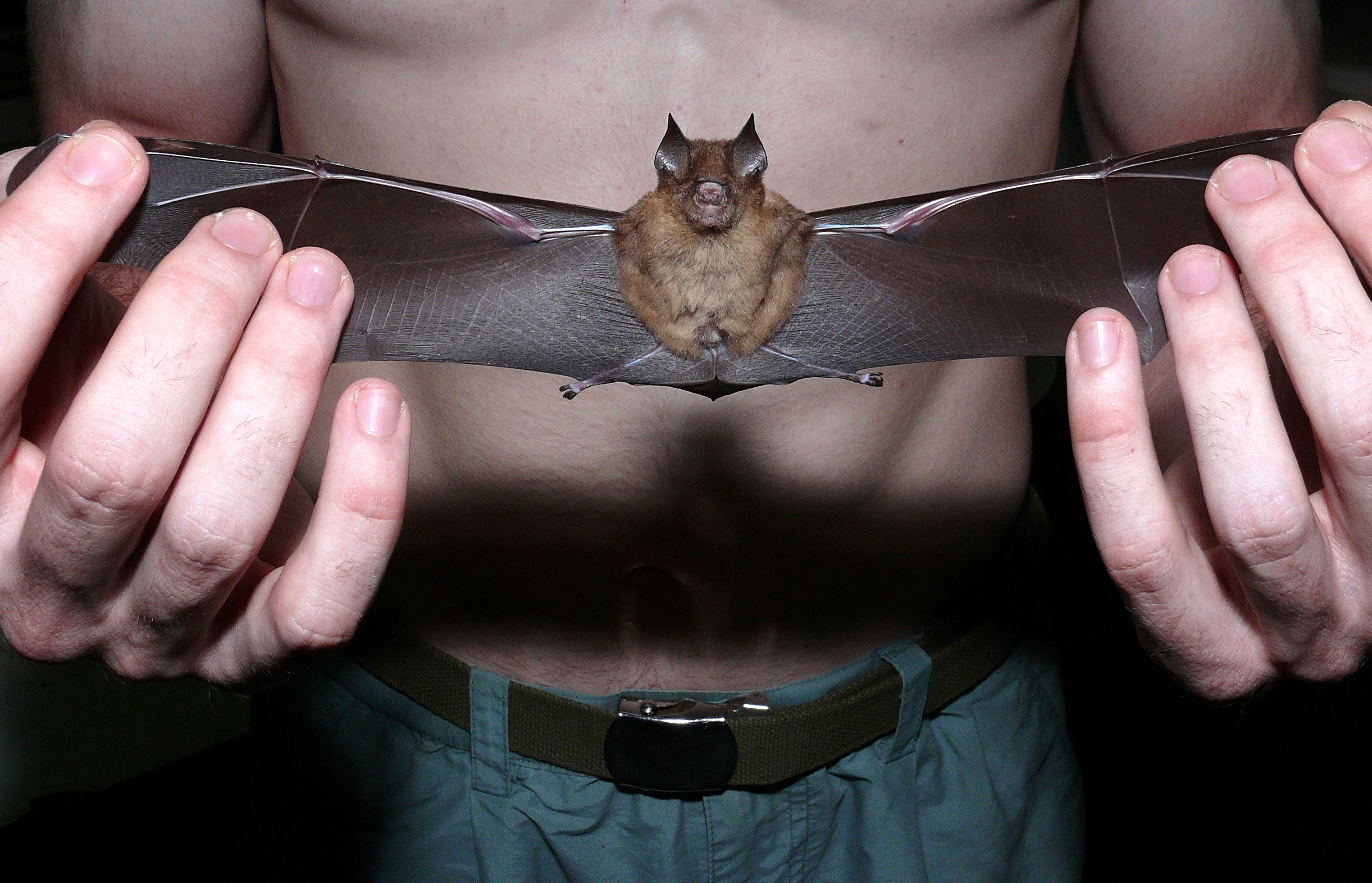 Bako NP, Sarawak, MALAYSIA